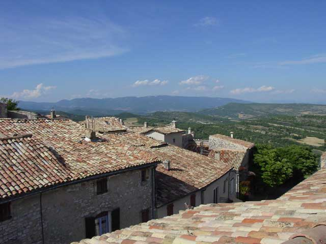 La montagne de Lure vue depuis les toits de Vachères Photo prise en 2002 par Vincent Stoltz alias V!NZ